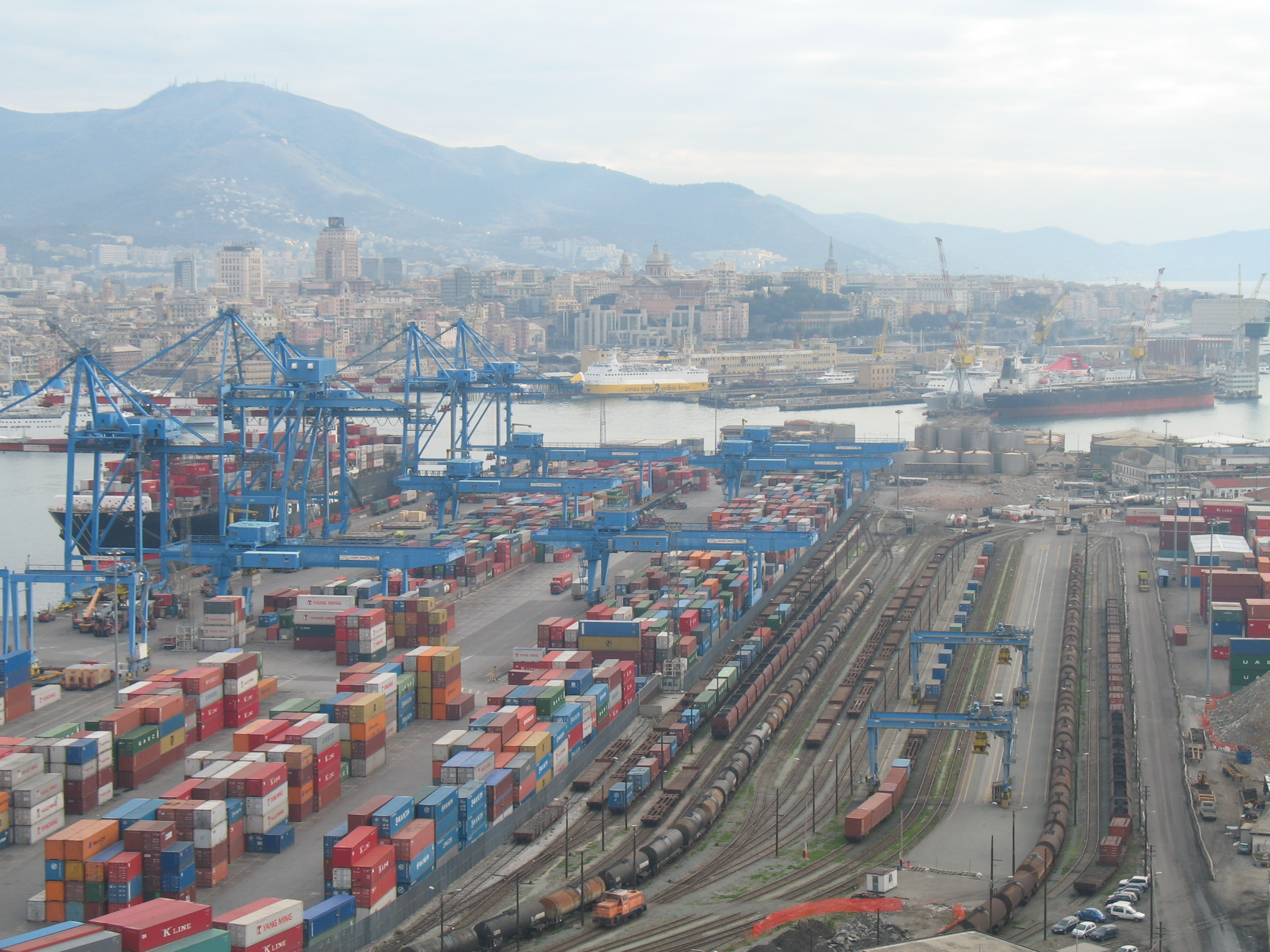 Immagine dal Porto di Genova (terminal, moli, container, calate, ecc.)